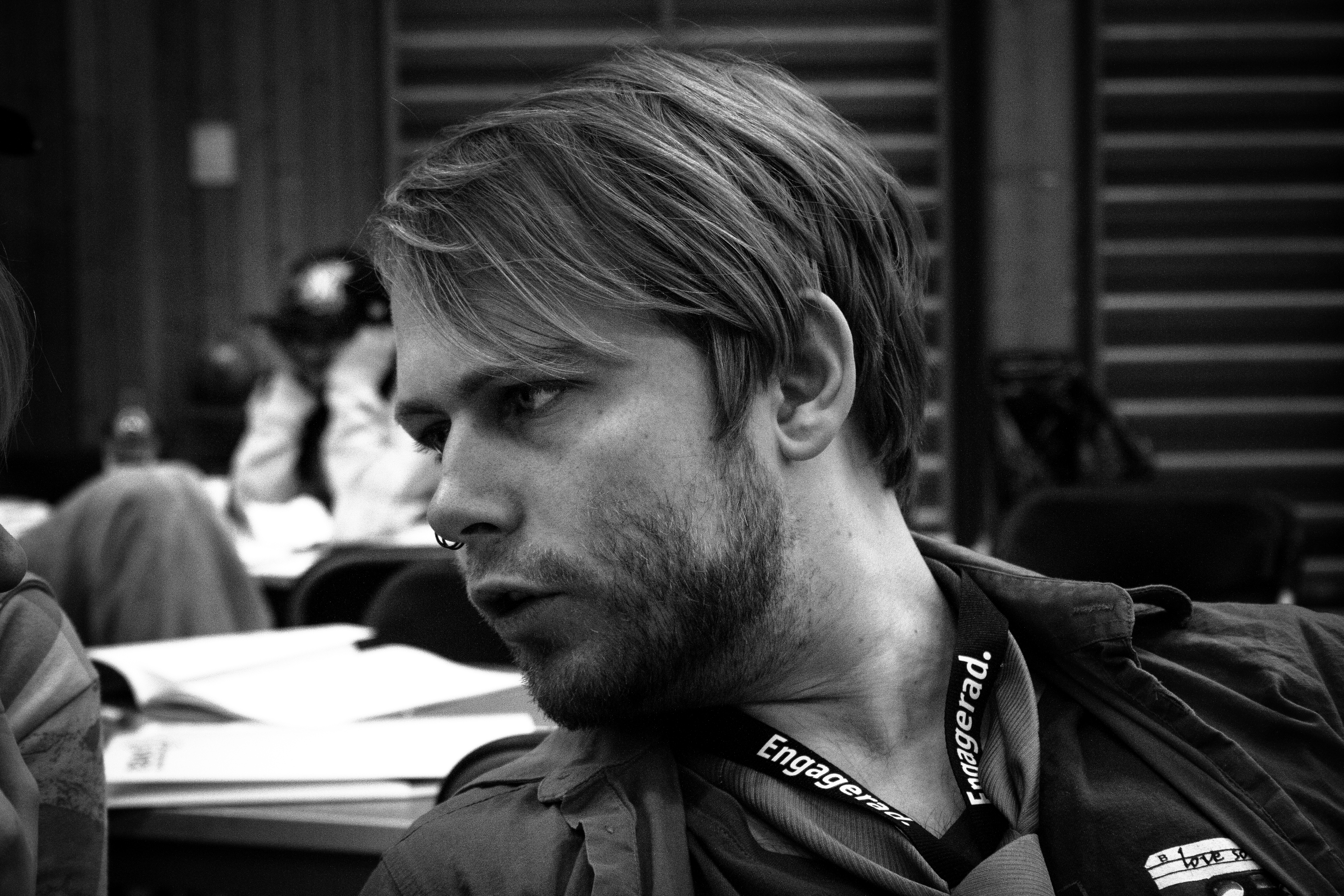 Tobias Jobring, förbundsordförande för Sveriges elevråd – SVEA 2009-2012, vid Elevrådskongressen 2012 i Klågerup.